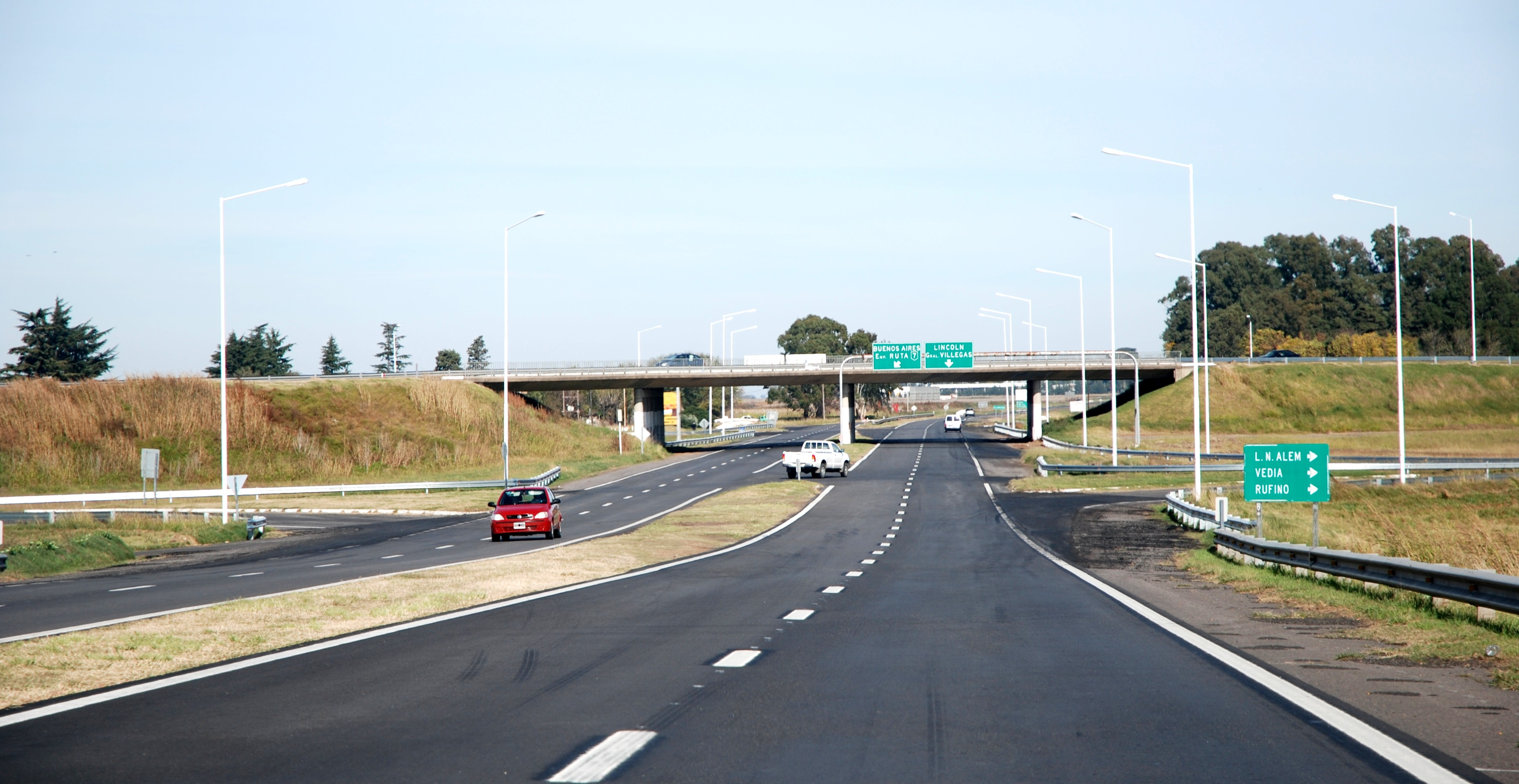 Ruta nacional 188 cerca de su cruce con la ruta internacional Nº 7 en Junín, Argentina.